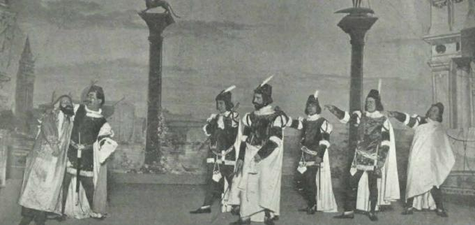 Escena del estreno de la obra El trust de los Tenorios, del dramaturgo español Carlos Arniches